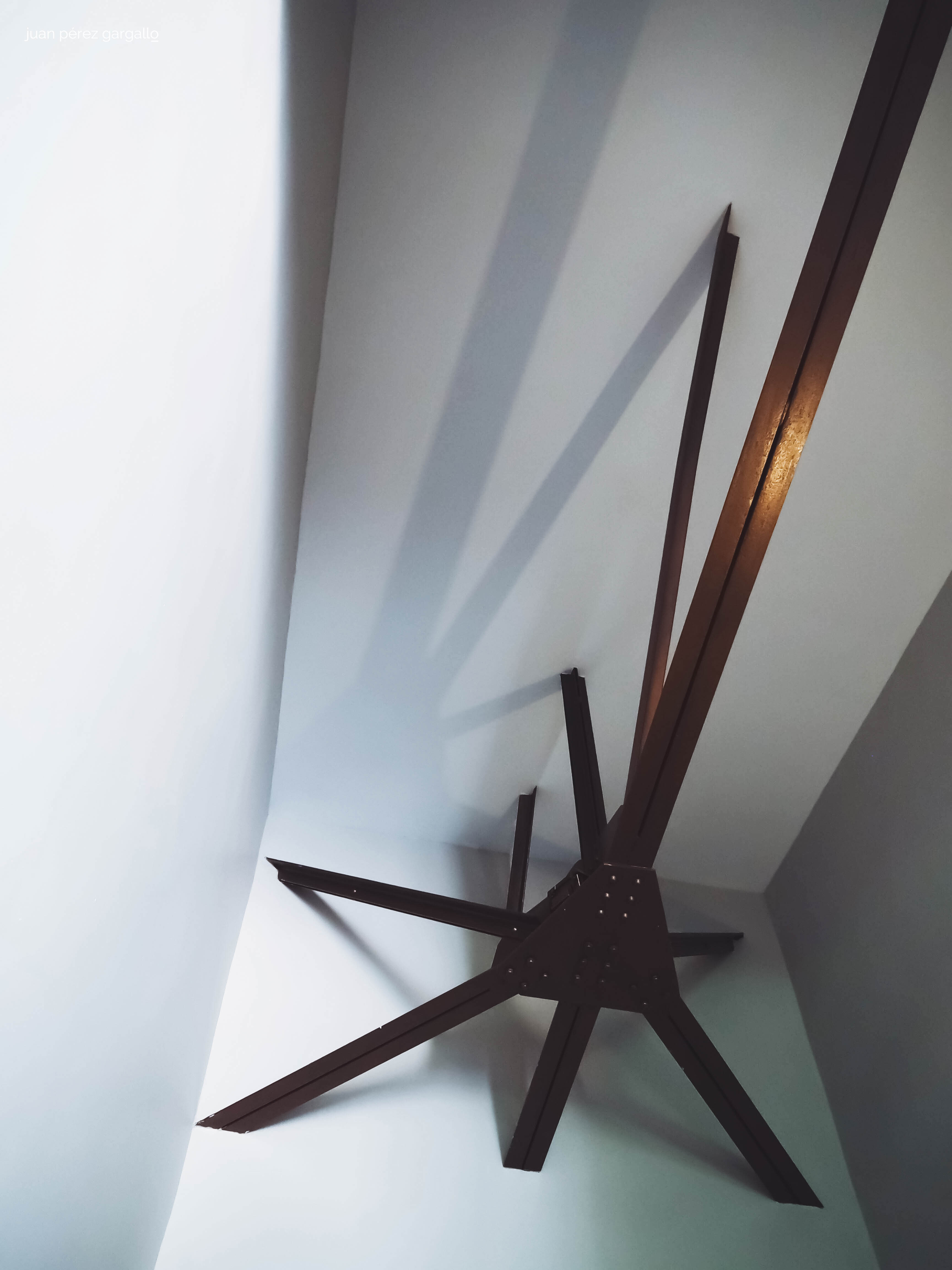 Estructura de acero en el Hotel Villa Virginia de Sabiñánigo